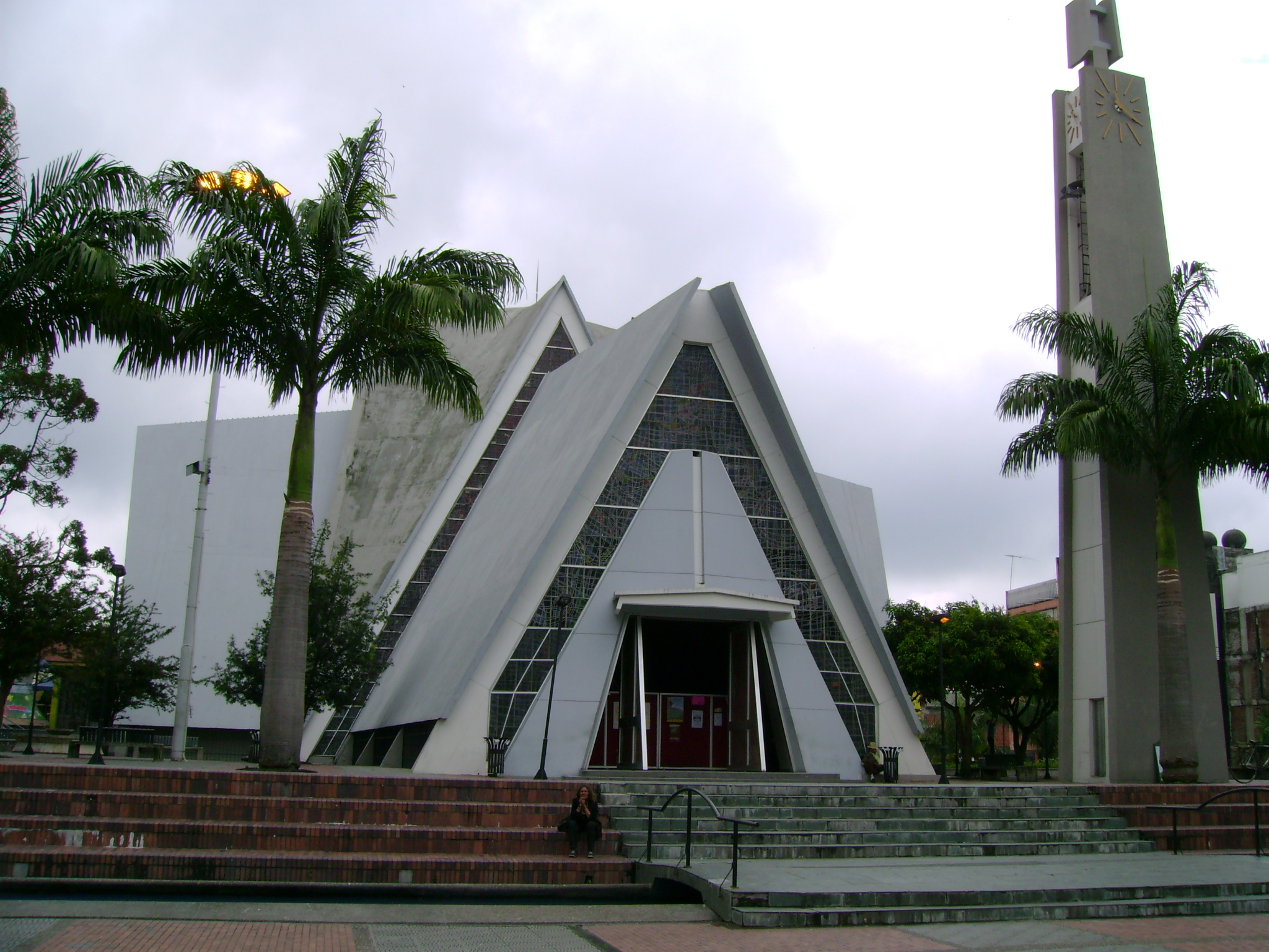 Catedral de la ciudad de Armenia, Quindío, Colombia.